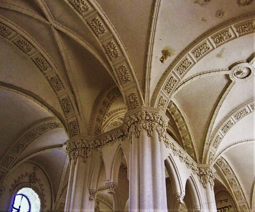 Главная синагога Гродно